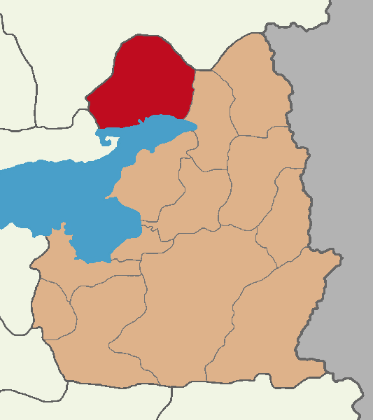 Erciş ilçesinin konumu